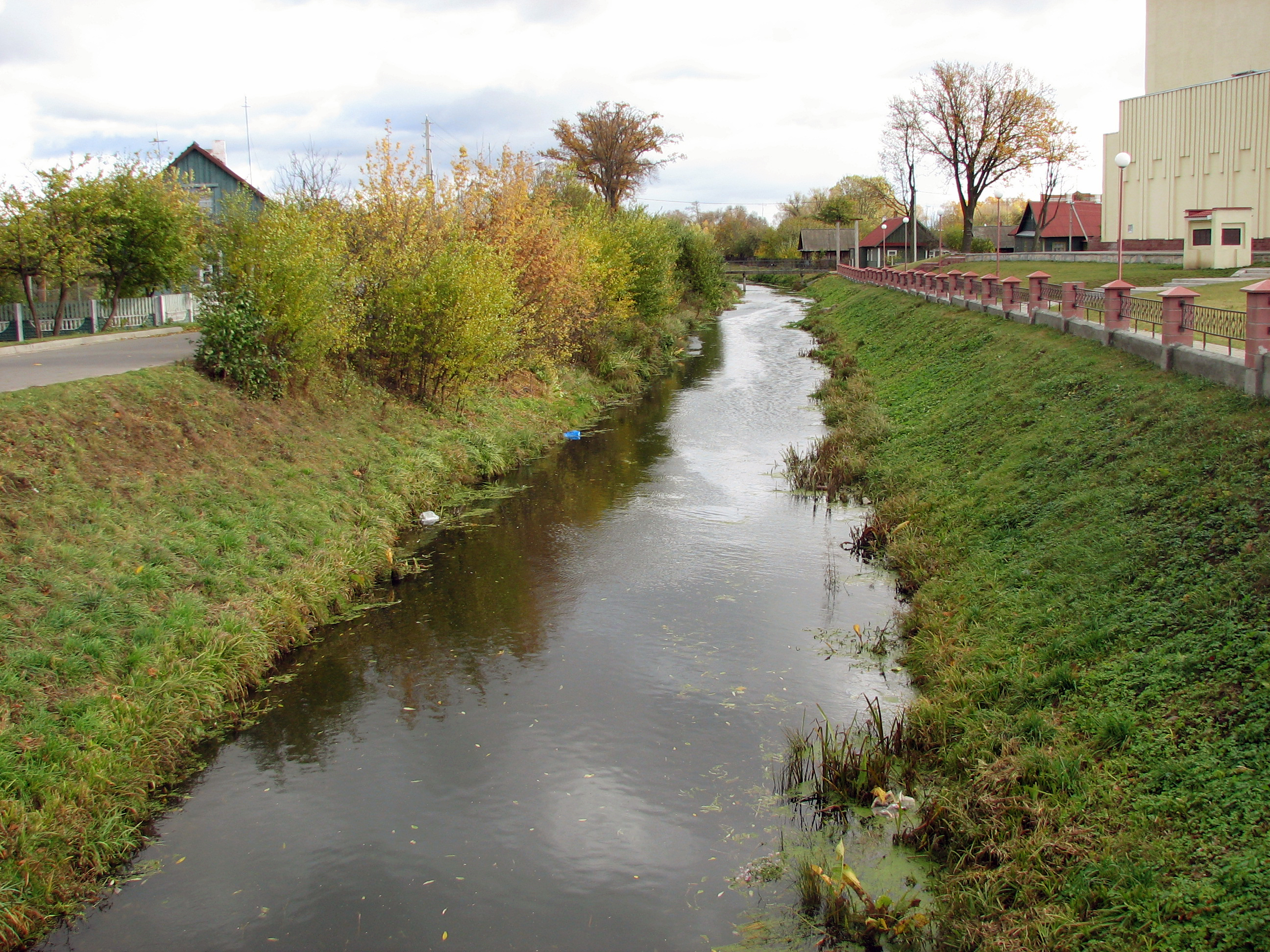 Беларуская (тарашкевіца): Мухавец ля вытоку ў Пружанах